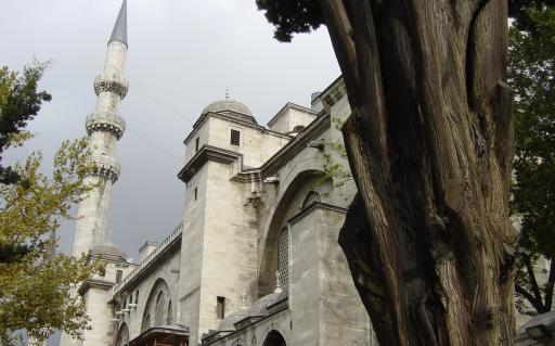 La mosquée de Soliman le magnifique